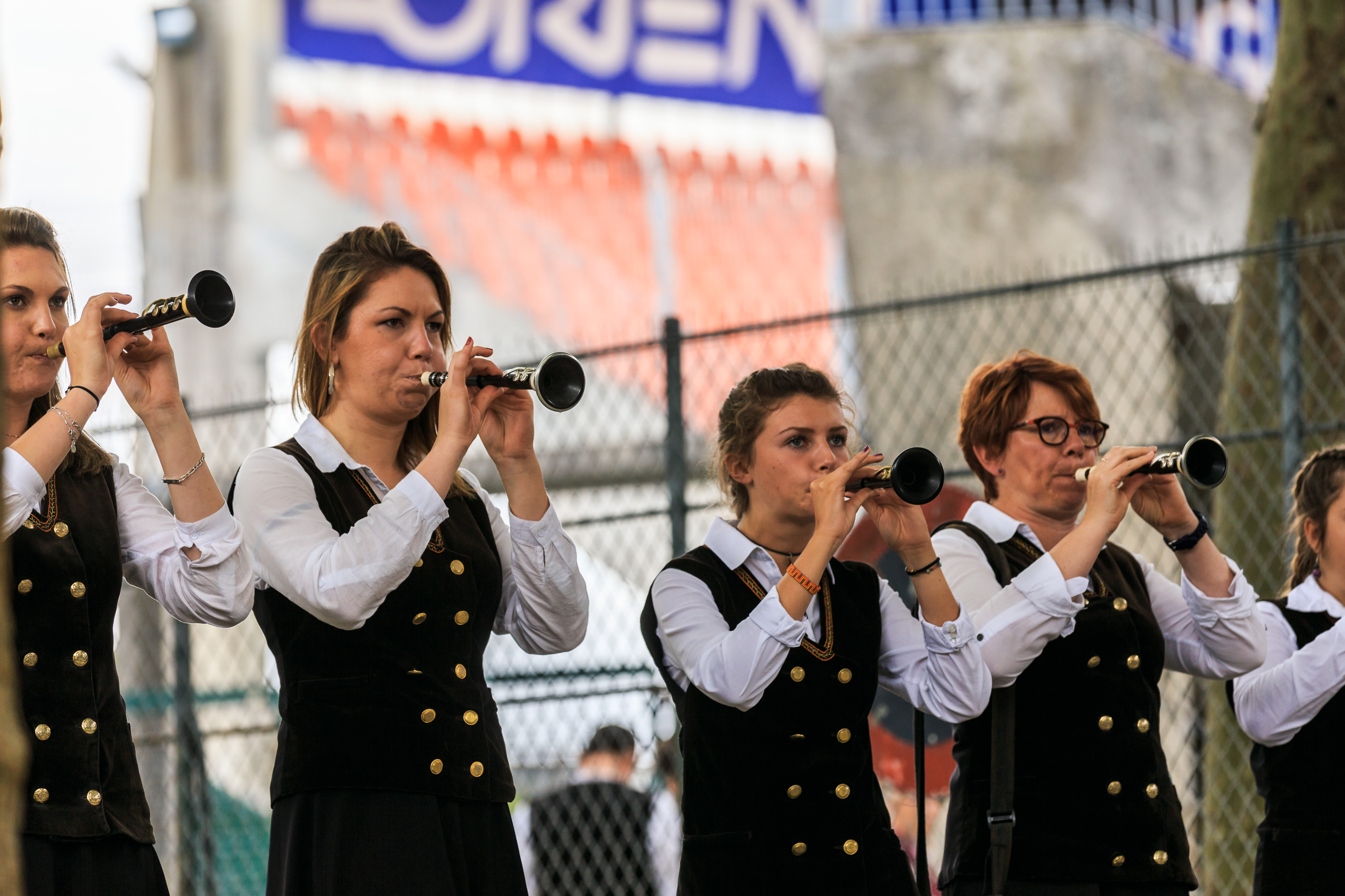 Épreuve d'été du Championnat national des bagadoù de Première catégorie organisée au stade du Moustoir dans le cadre du Festival Interceltique de Lorient en Bretagne.